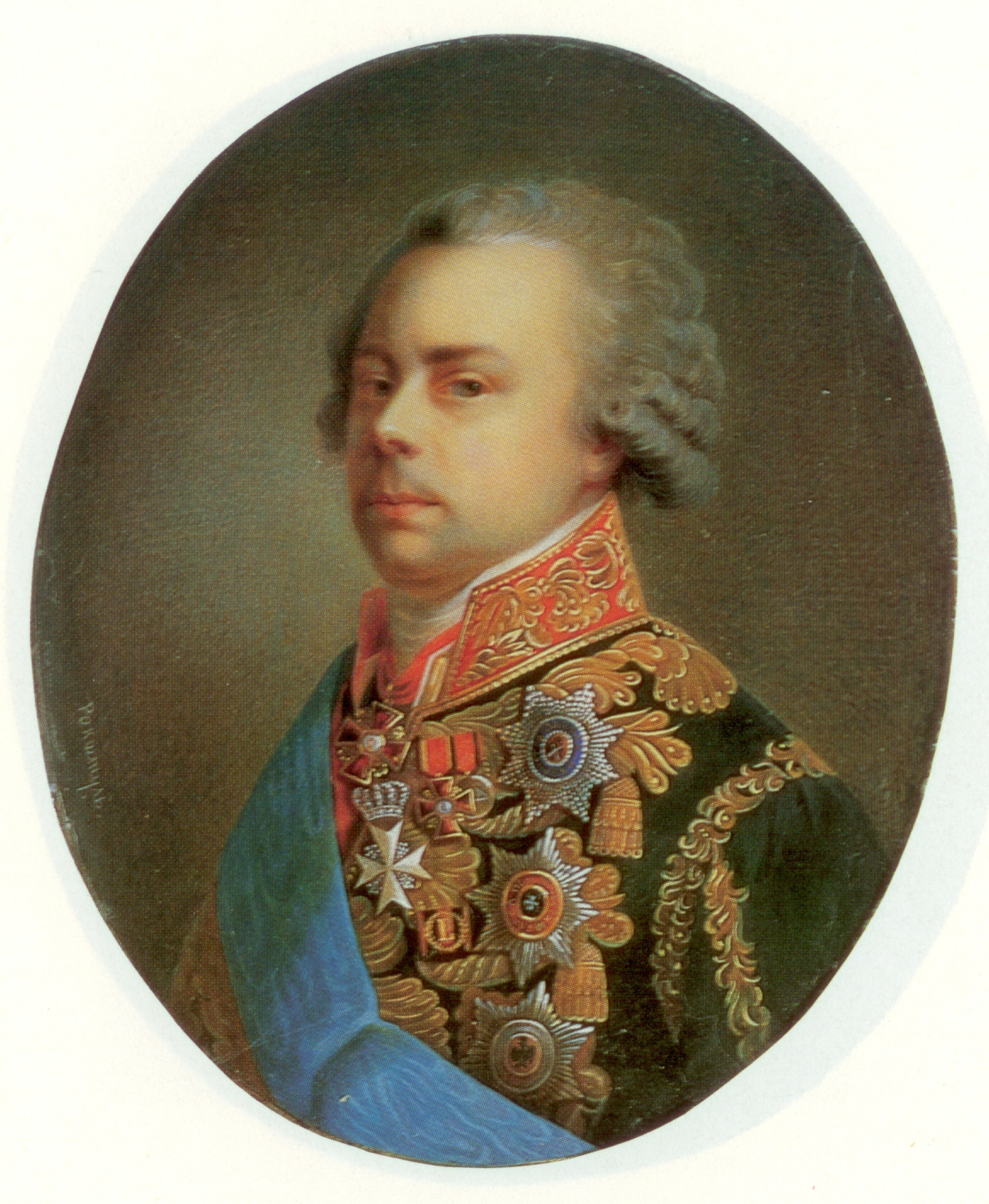 Миниатюра князя Н.Б.Юсупова с портрета И.Б.Лампи